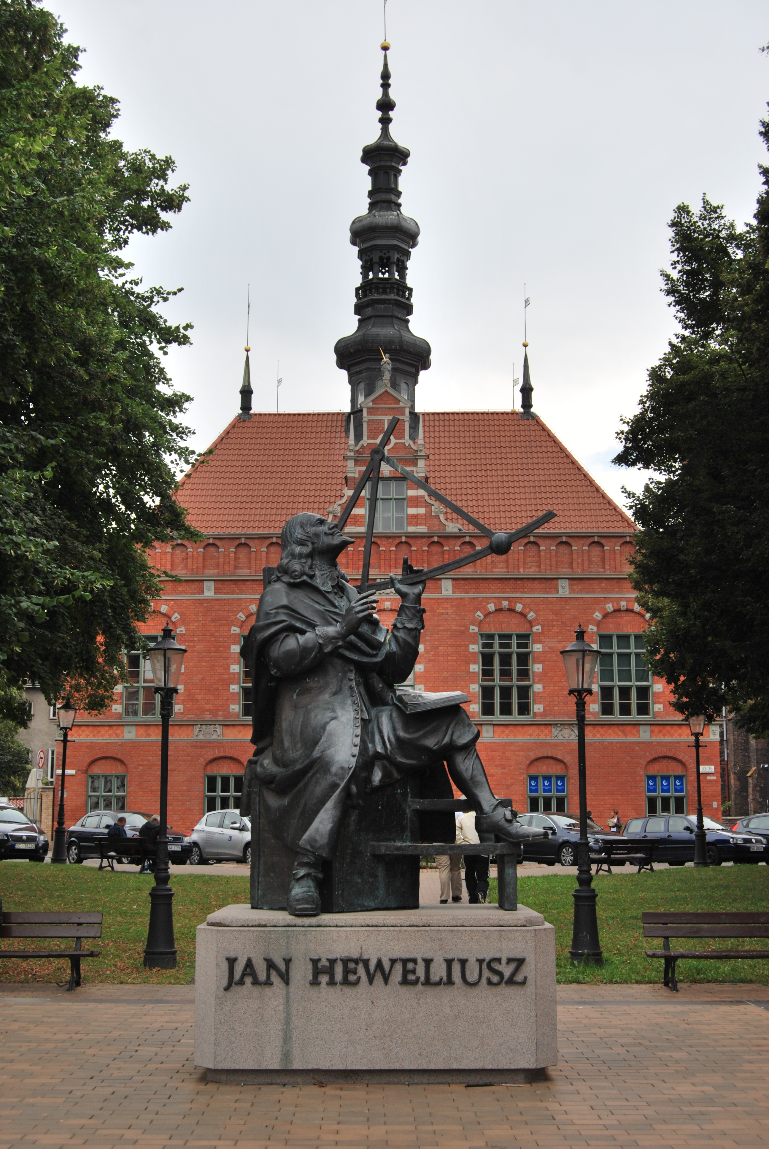 Gdańsk, ratusz staromiejski, ob. Woj. Ośrodek Kultury, 1587-1589